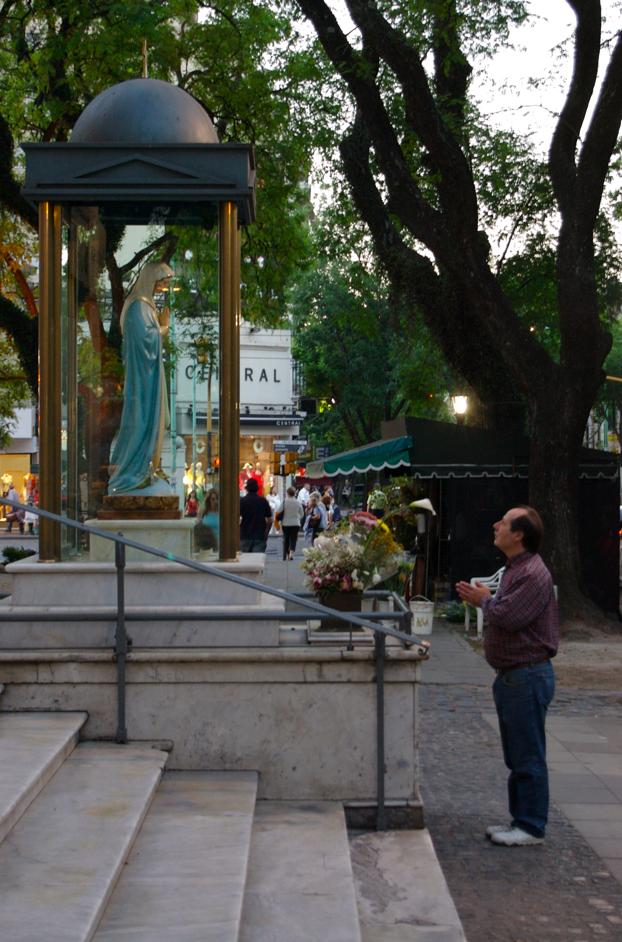 Ermita de la Virgen, Parroquia Inmaculada Concepción (La Redonda), barrio de Belgrano, Buenos Aires, Argentina.